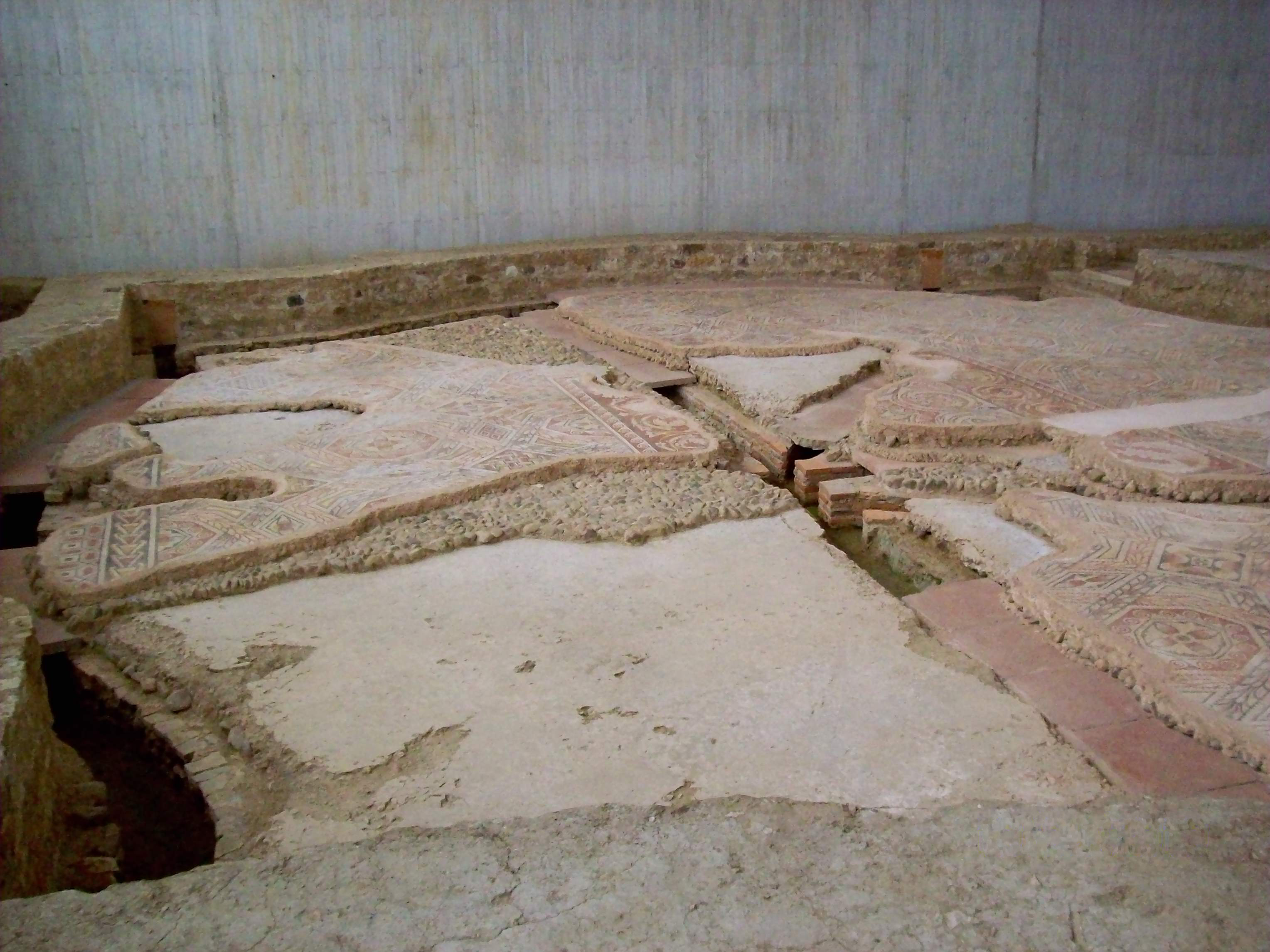 Gran habitación circular, con las esquinas cuadradas y calentada mediante hipocaustum en las termae de la villa romana "La Olmeda", Pedrosa de la Vega, Palencia, España. El suelo está pavimentado con opus signinum al que se superpone opus teselatum, es decir, mosaico.